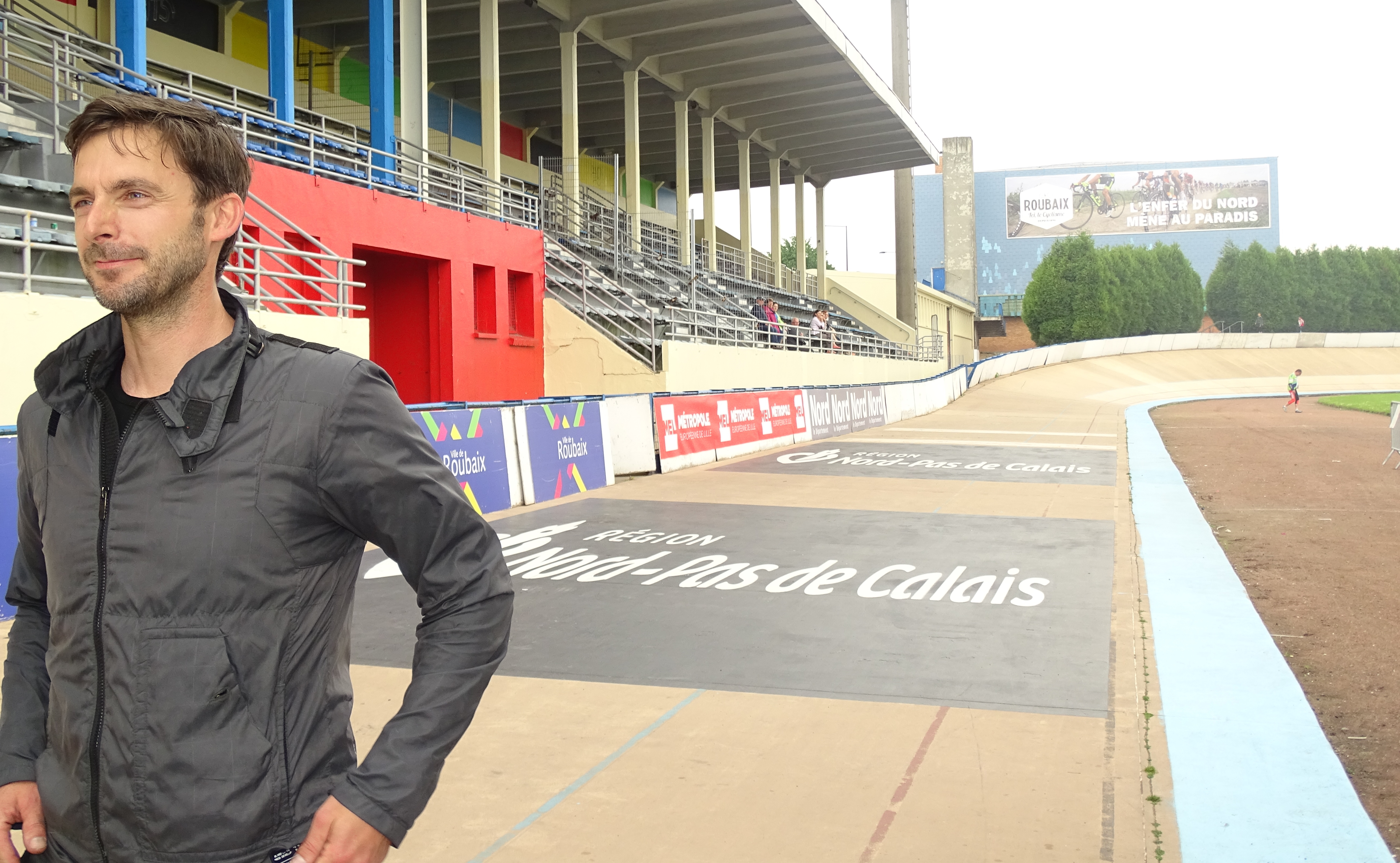 Reportage réalisé le dimanche 29 mai à l'occasion de l'arrivée du Paris-Roubaix espoirs 2016 au vélodrome André-Pétrieux à Roubaix, Nord, Nord-Pas-de-Calais-Picardie, France. Depicted person: Servais Knaven